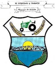 escudo municipal del municipio de saldaña